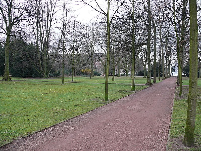 Langenbergpark Bocholt, eigenens Bild